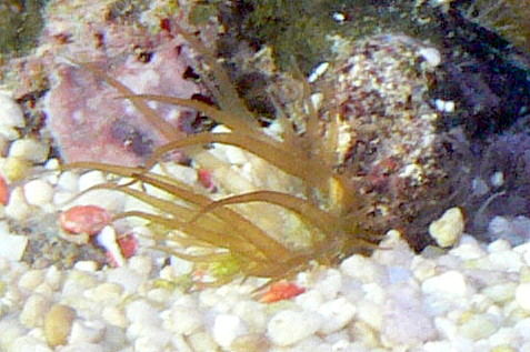 Aiptasia sp.